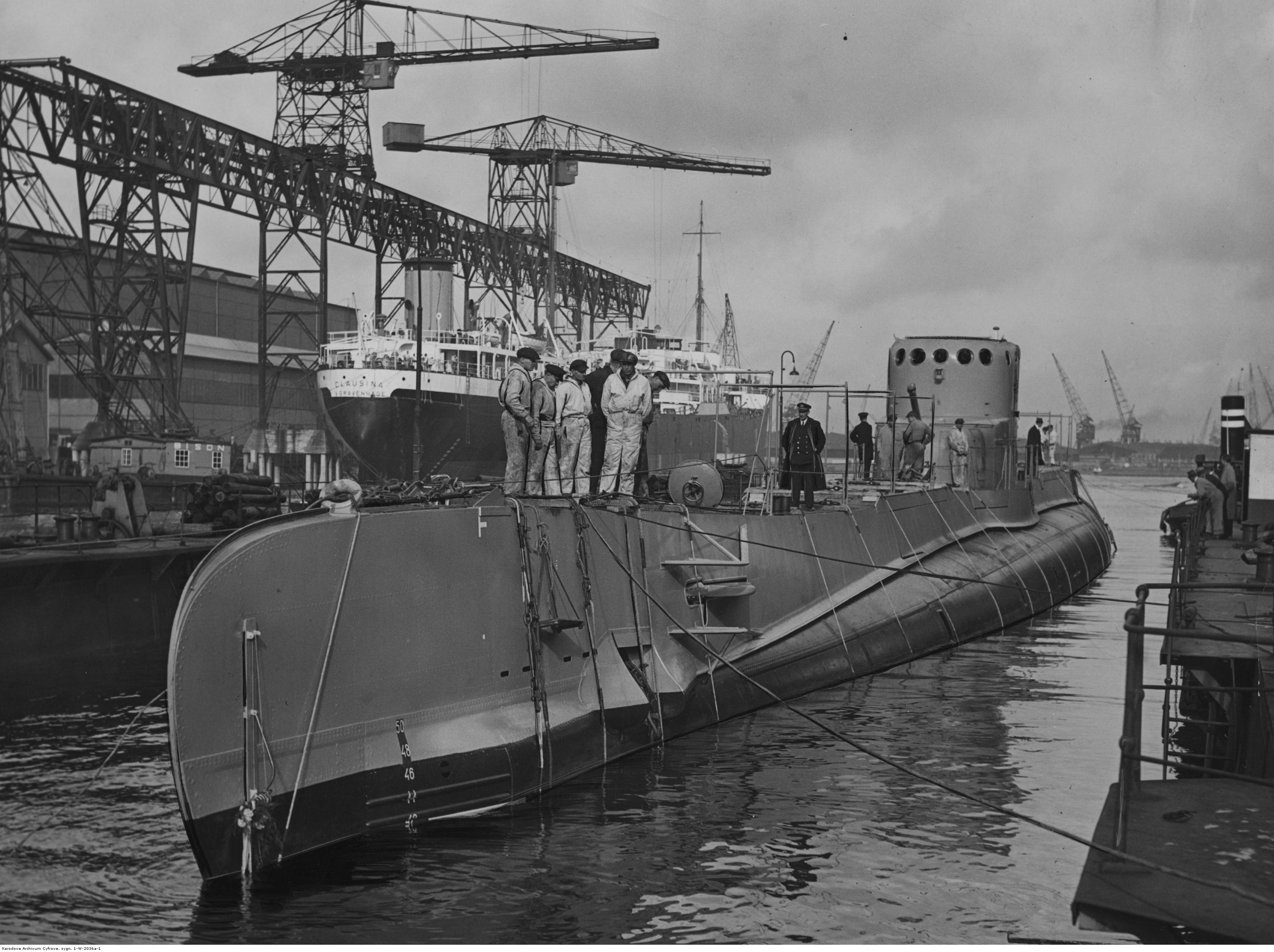 ORP "Sęp" w doku w stoczni w Vlissingen